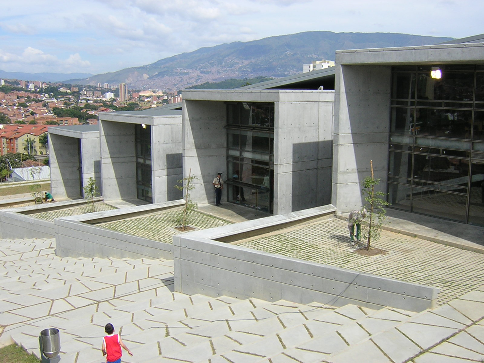 Biblioteca San Javier, Medellín, Colombia